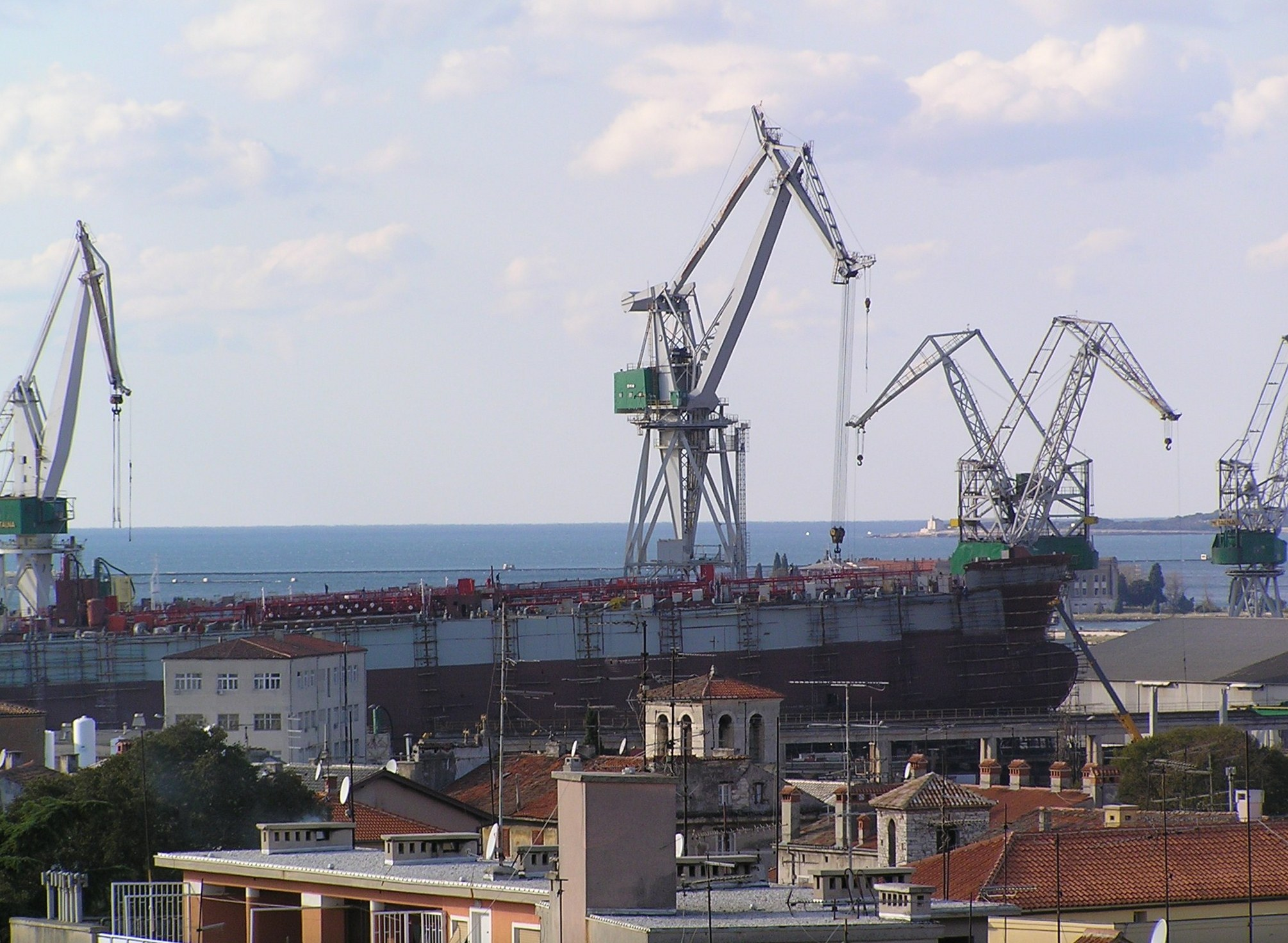 Uljanik shipyard, Pula panorama self-made